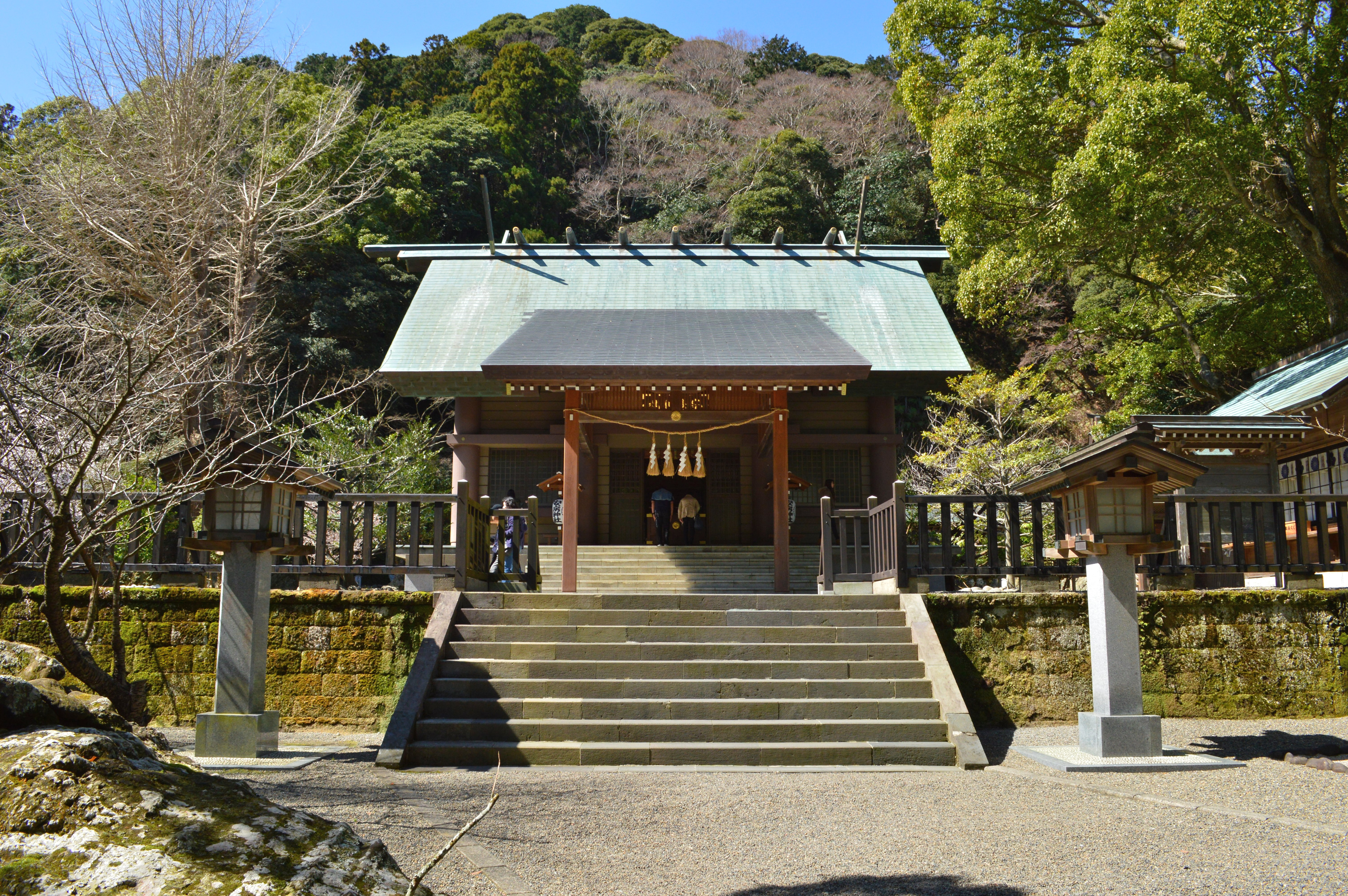 安房神社 拝殿